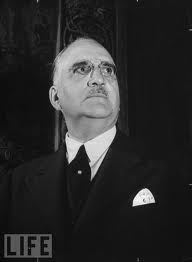 E. R. Guiñazú